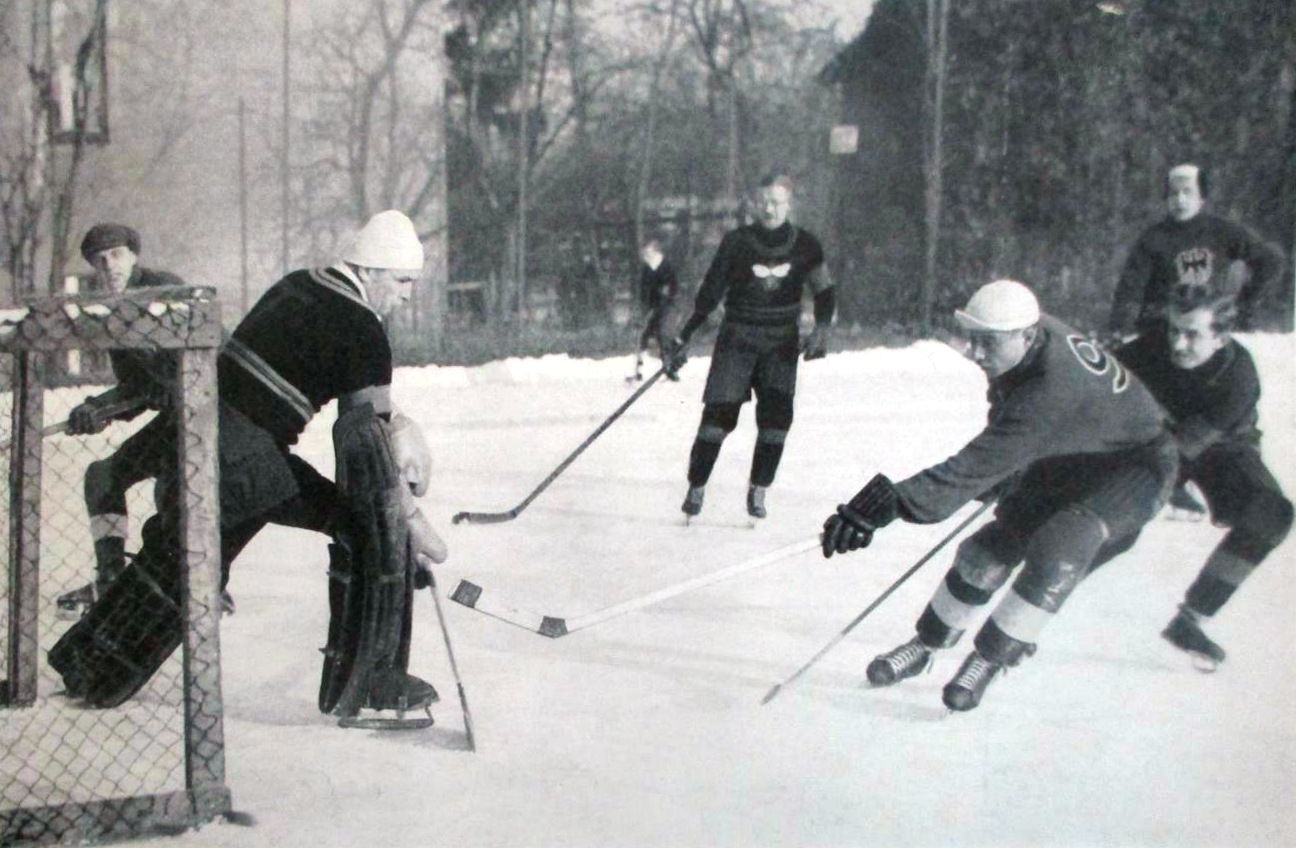 SC Brandenburg gegen Zehlendorfer Wespen 4:0, Berlin-Liga, 18. 12. 1933